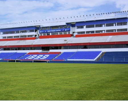 Estadio Parque Central (Nacional, Uruguay)